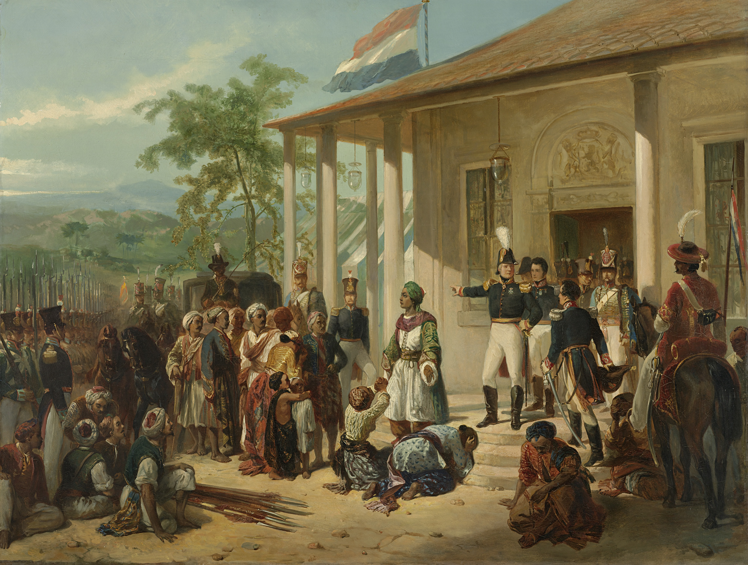 De onderwerping van Diponegoro aan luitenant-generaal Hendrik Merkus Baron de Kock, 28 maart 1830, waarmee de Java-oorlog (1825-30) werd beëindigd. Voor de woning van De Kock wordt de Javaanse prins Diponegoro gearresteerd. Links de Nederlandse soldaten en de koets waarmee de prins wordt afgevoerd. De volgelingen van de prins zitten links, hun wapens liggen op de grond.; Nicolaas Pieneman (1809–1860), olieverf op doek, ca. 1830–1835